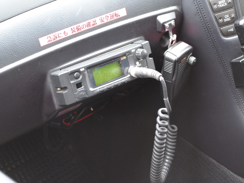 パトカーに搭載されるAPR-ML1型無線機。